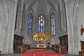 choeur